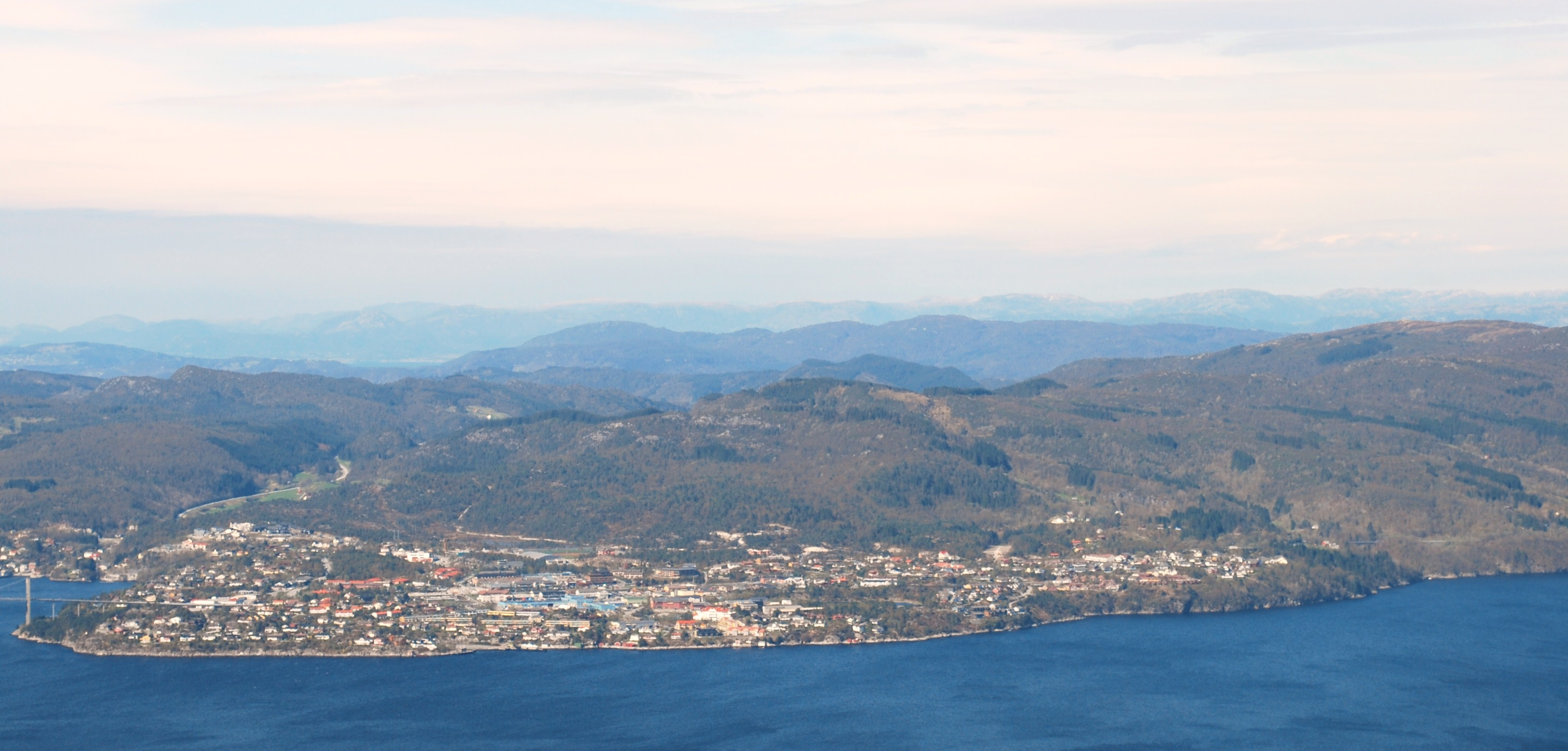 Knarvik sett fra Høgstefjellet i Bergen kommune.